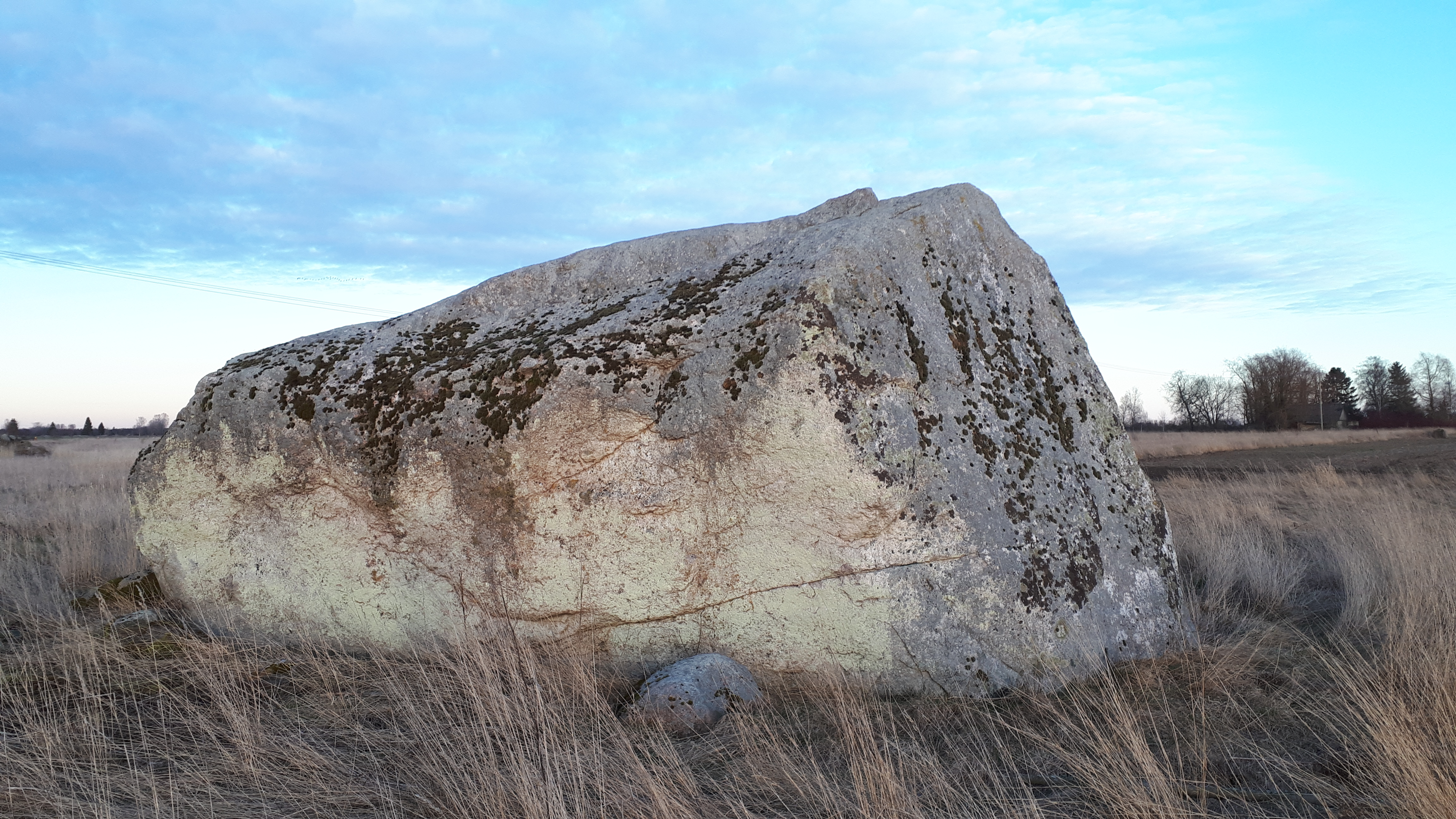 Kostivere liukivi